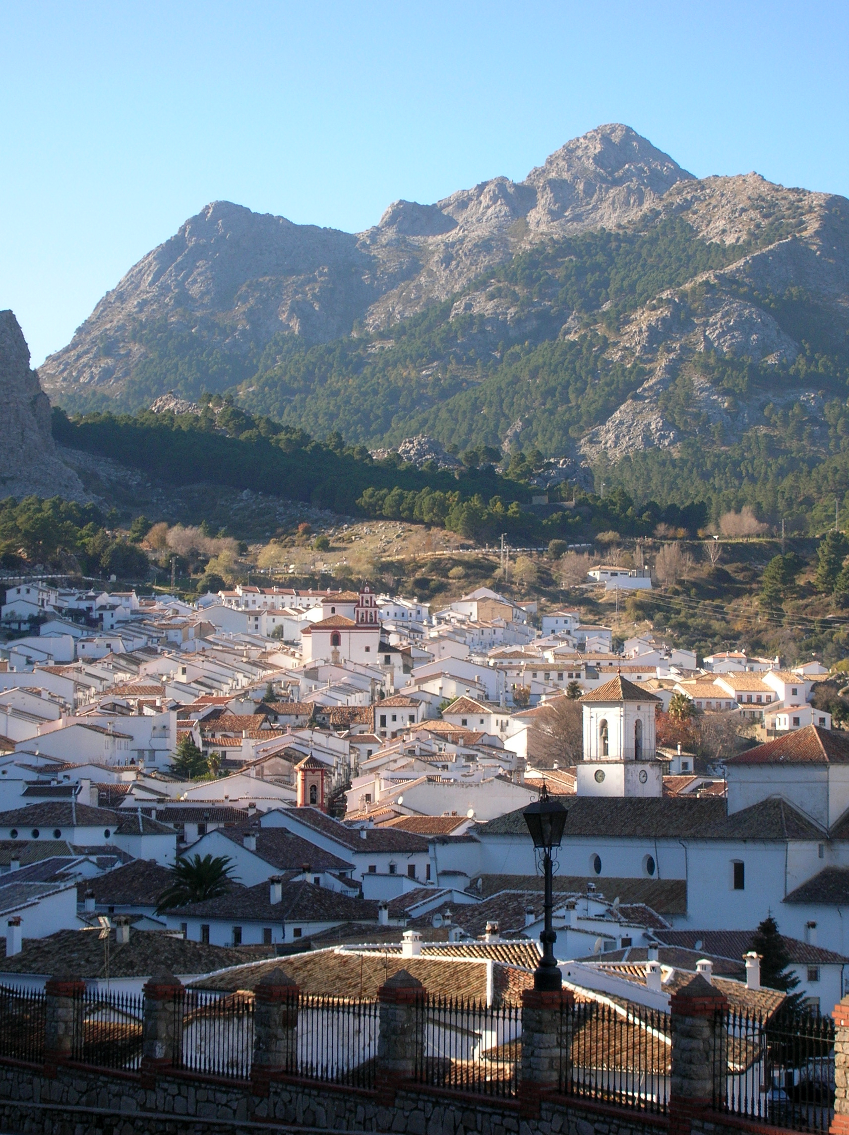 Vue générale de Grazalema (Andalousie, Espagne)